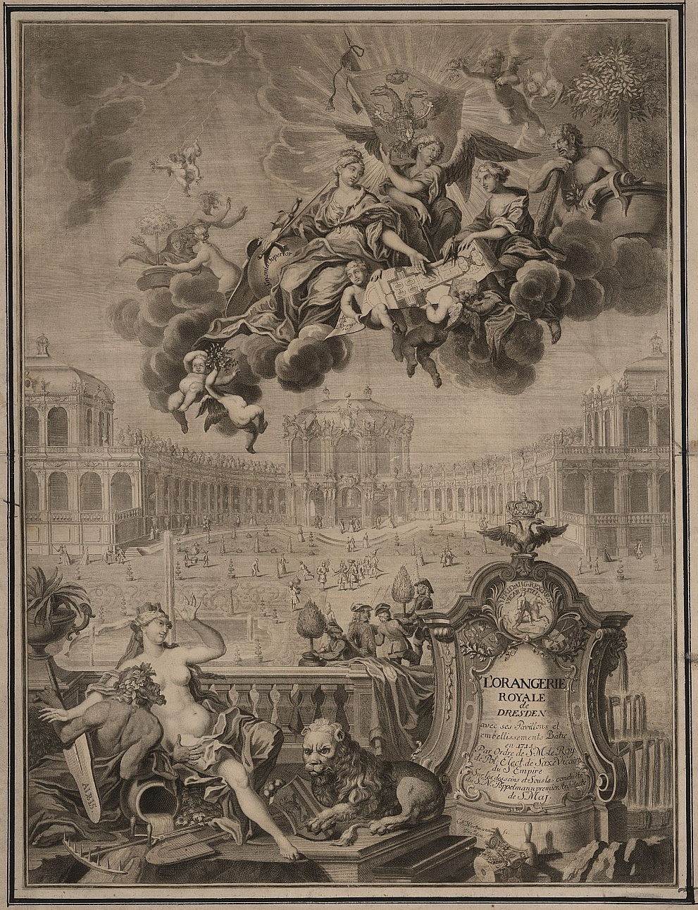 Titelblatt des von Matthäus Daniel Pöppelmann herausgegebenen Kupferstichwerks zum Dresdner Zwinger. Kupferstich von Christian Albrecht Wortmann. Titel: L'Orangerie Royale de Dresden : avec ses Pavillons et embellissements Bâtie en 1711 ; par Ordre de S. M. de Roy de Pol. Elect. de Saxe Vicaire du S'Empire / Sur les desseins et Sous la conduite du S. N. Pöppelmann. Maße: 45 x 59 cm.